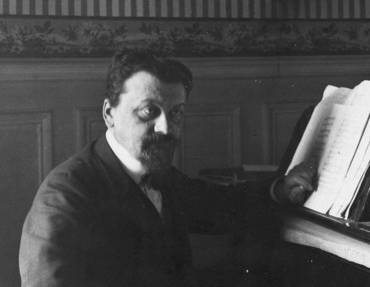 Jules Combarieu, professeur au Collège de France, vue resserrée